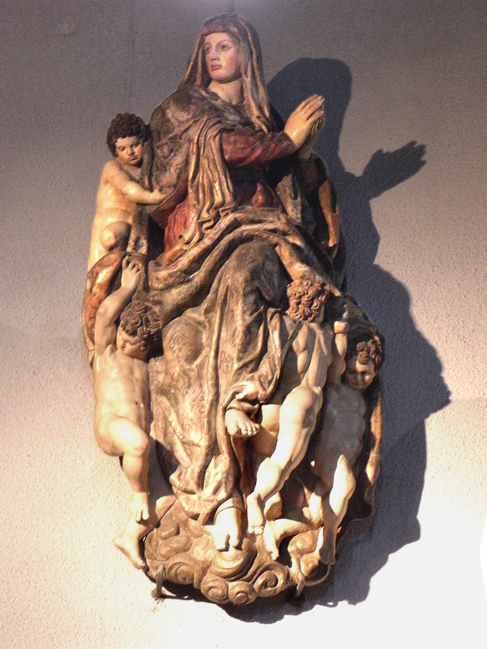 Intérieur de la basilique Notre-Dame d'Arcachon (33). Groupe de l'Assomption.